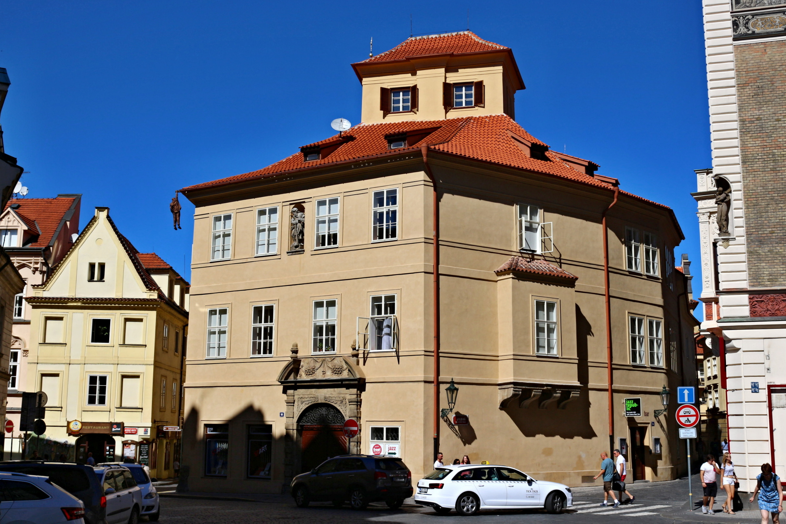 Dům U Sladkých